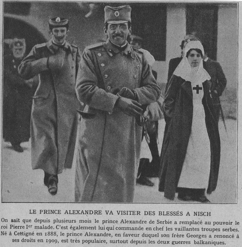 Alexandre de Serbie en visite sur le front de la Drina.